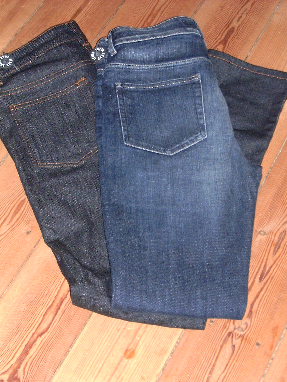 Cowboybukserne bliver flashet på Kassen i morgen.